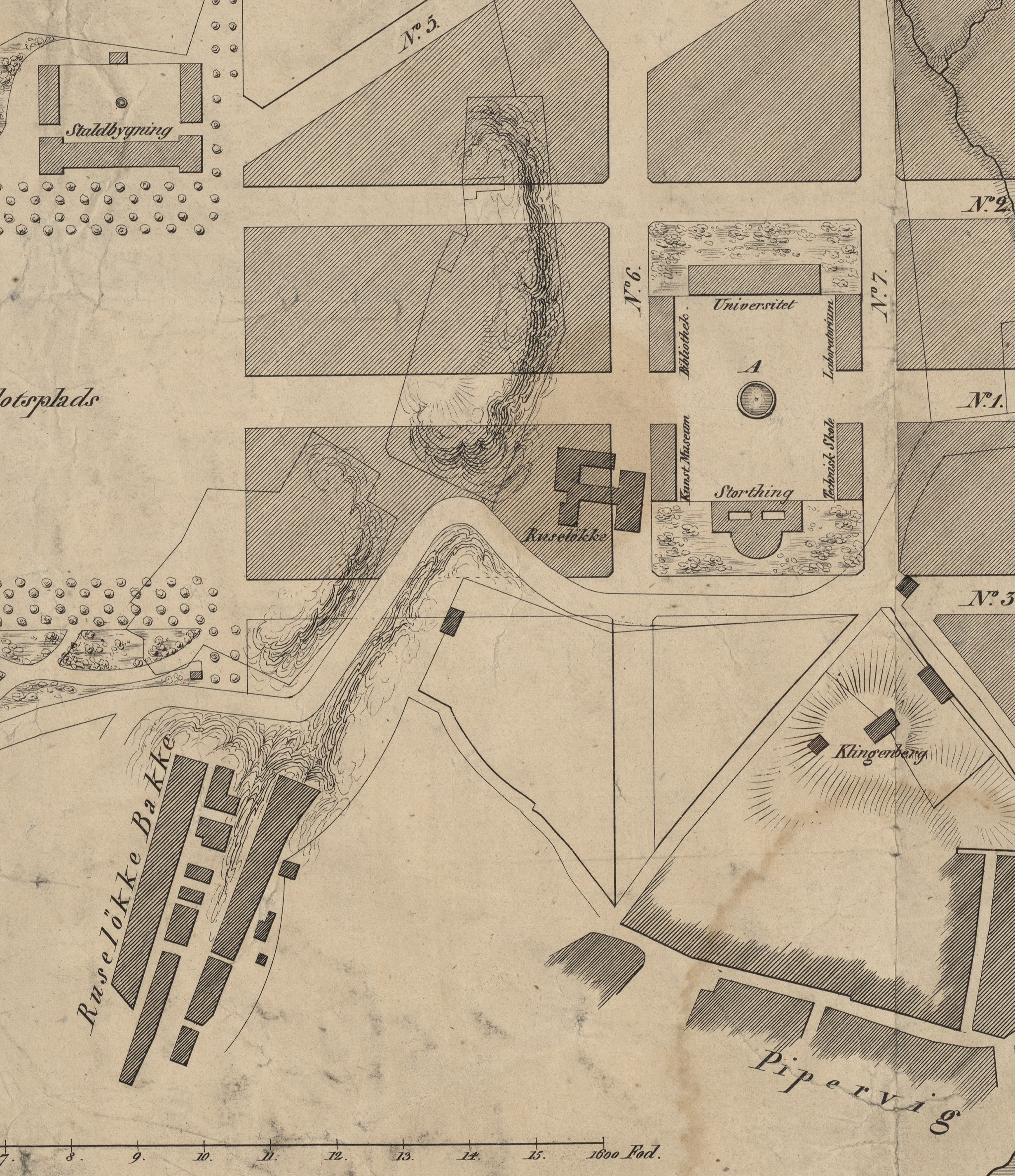 Kart fra Nasjonalbibliotekets kartsamling. Kartet er gitt ut i Christiania (1838) og viser Slottet, Christiania.